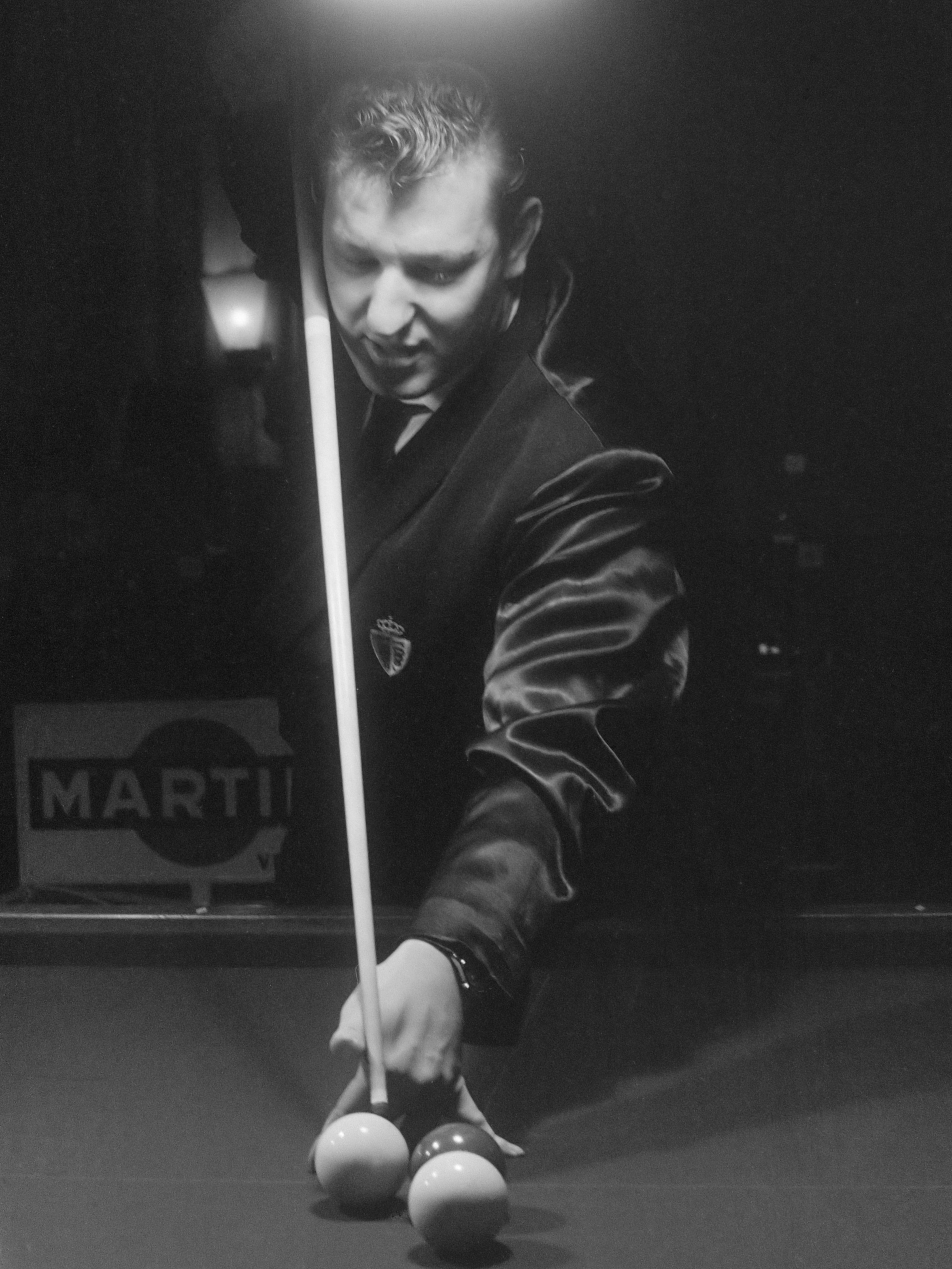 Europese Kader 71/2 Kampioenschappen in Den Helder . De Belg Ceulemans aan stoot 28 februari 1963